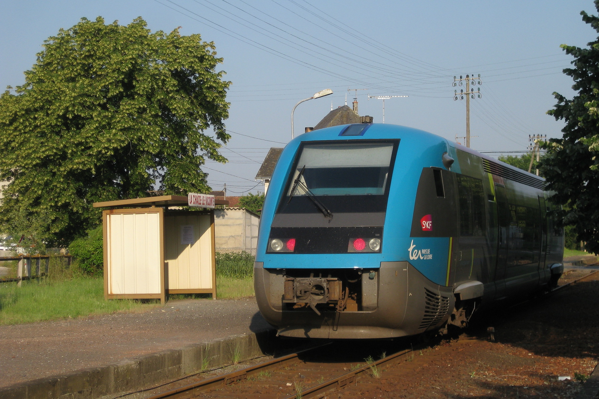 Un TER assuré par un ATER en gare de La Chaize-le-Vicomte.